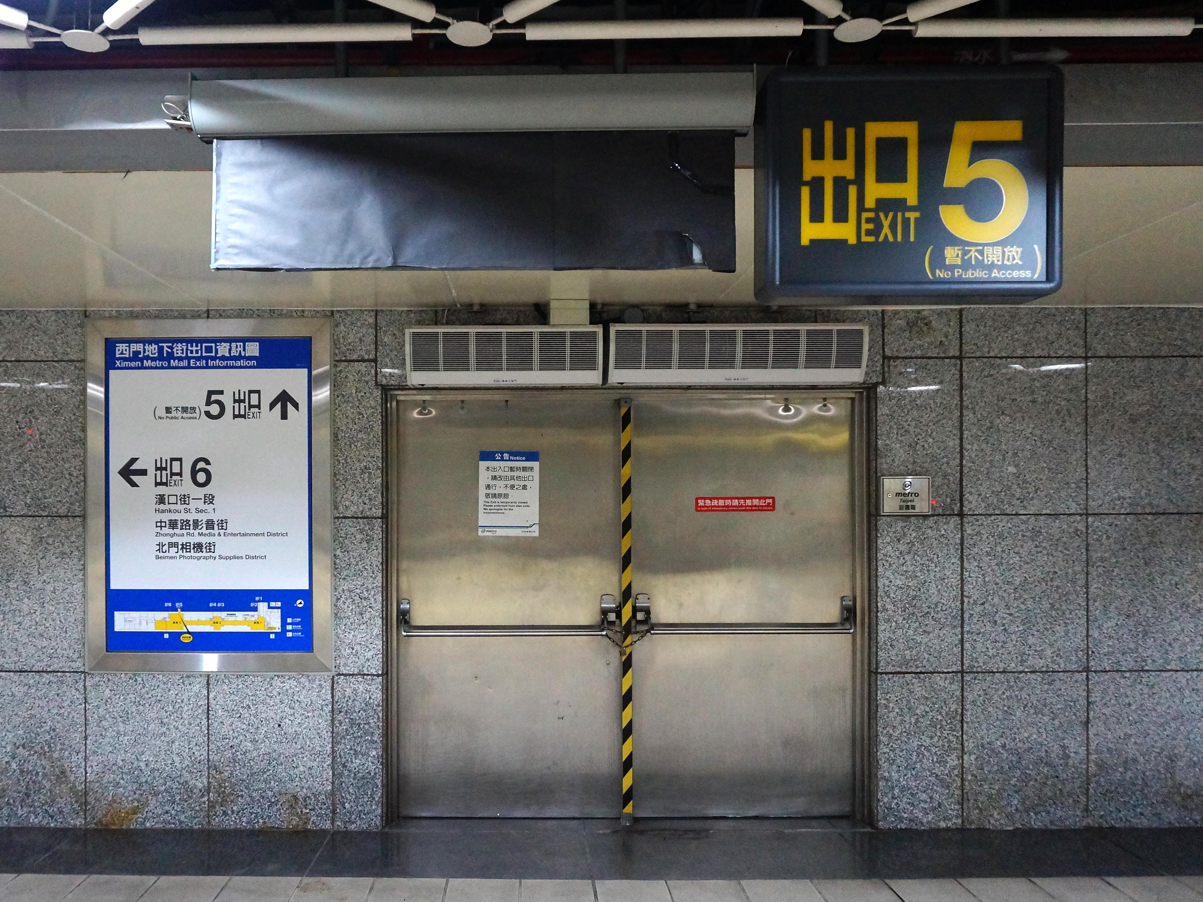 臺北市西門地下街5號出口封閉中。